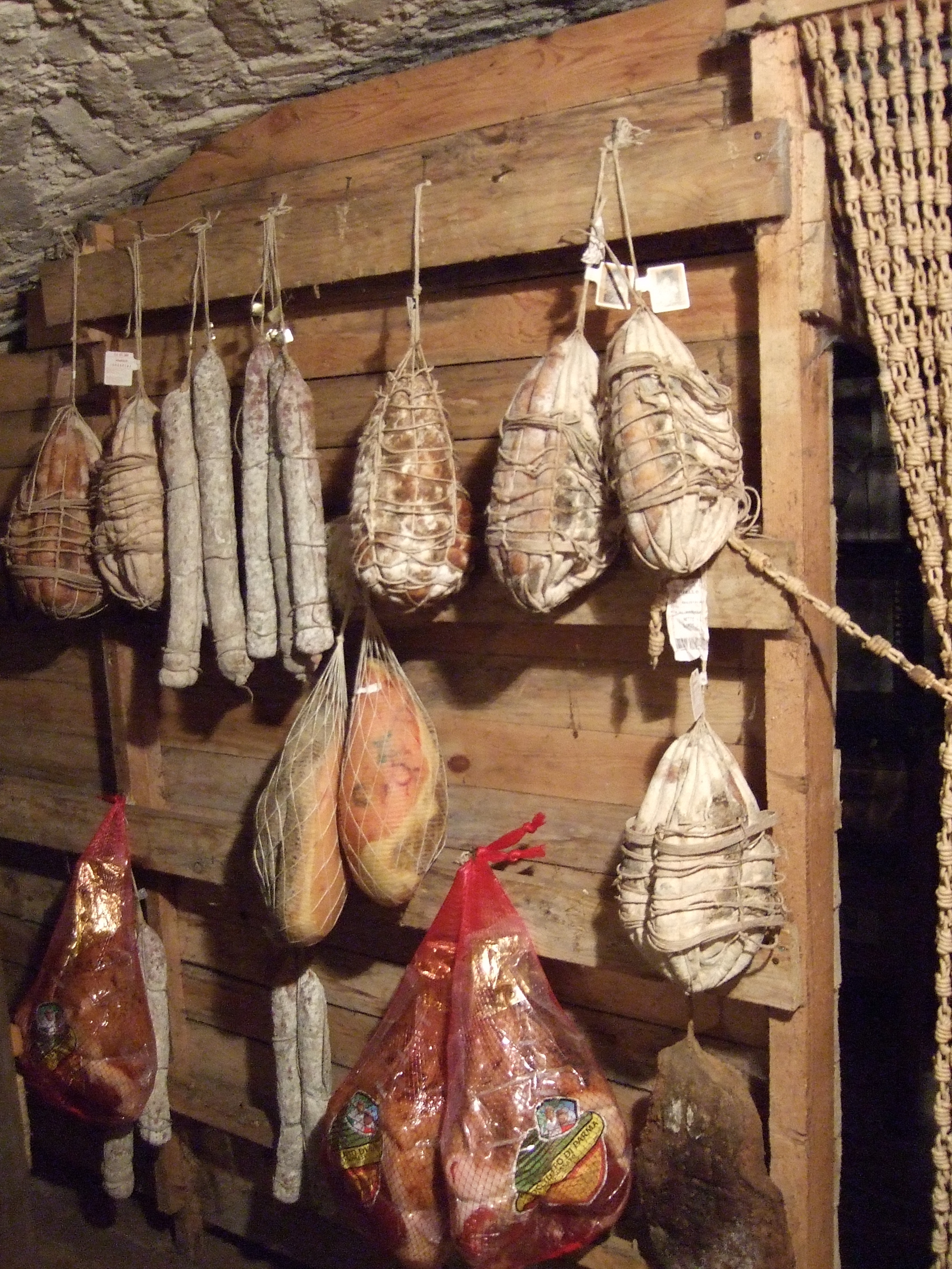 Parma, stagionatura salumi Parma (Italy), aging meat